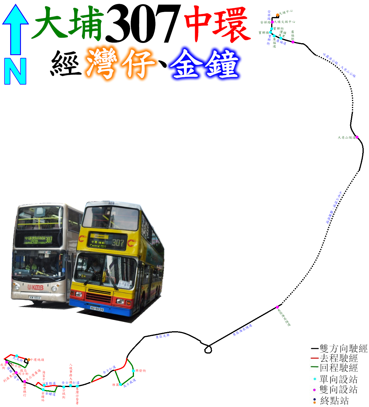 中文（香港）: 過海隧巴307線的走線圖